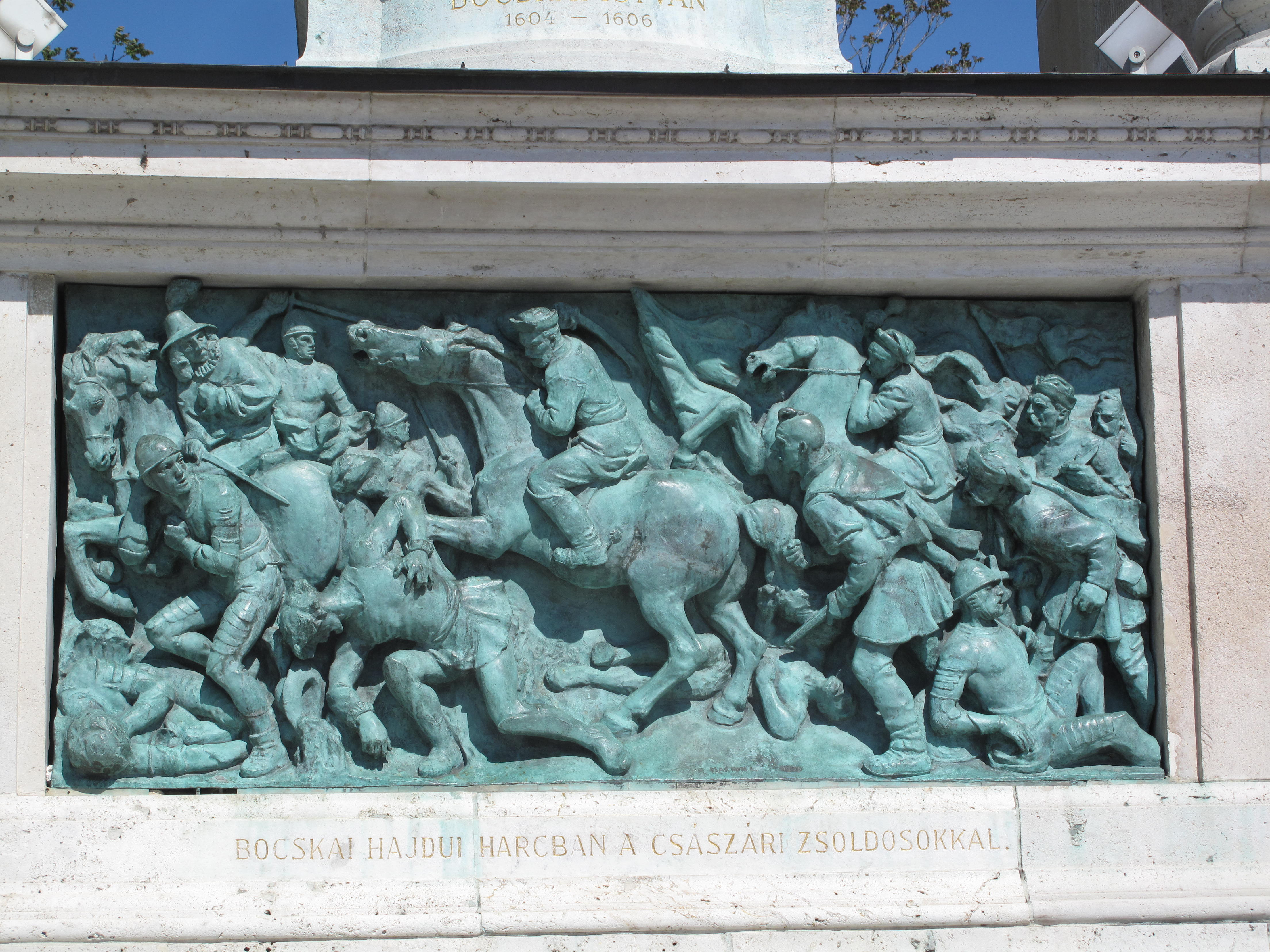 Náměstí Hrdinů, Budapešť